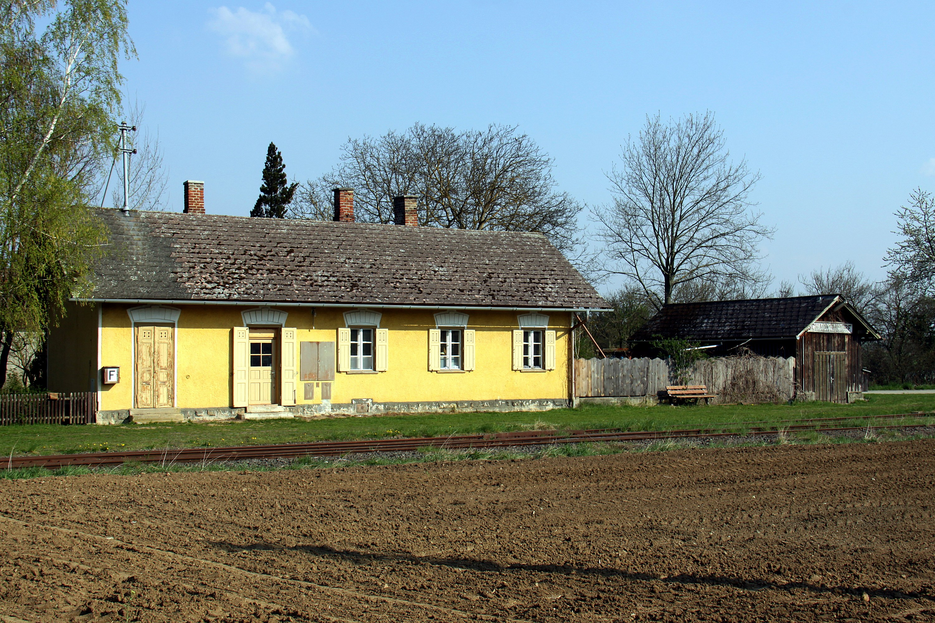 Pinkatalbahn - Halte- und Ladestelle in Schachendorf Object location47° 15′ 45.28″ N, 16° 25′ 48.26″ E